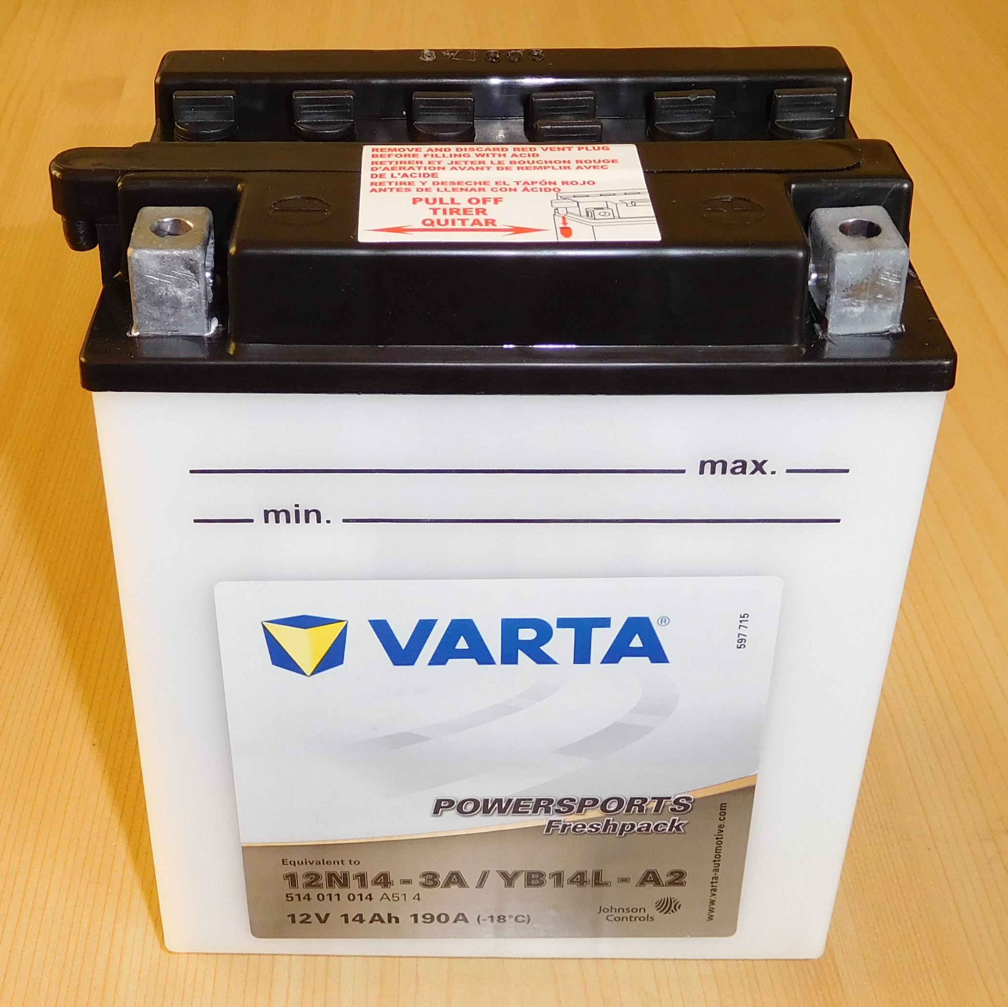 Batterie Varta 12 V, 14 Ah, 190 A (-18 °C), à remplir d'électrolyte (voir photo ci-dessous) ; pour moto de moyenne cylindrée.